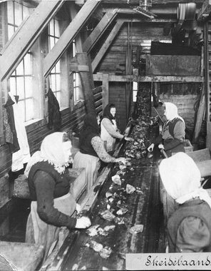 Skjeiderhuset på Sandnes. For å få rikere malm ble gråberg sjeidet (manuelt plukket) ut fra malmen. Mange kvinner (sjeidersker) hadde dette arbeidet. Det var et kaldt arbeid om vinteren og de måte kle seg godt. 1910 - 1915. SG.F.10009-0201